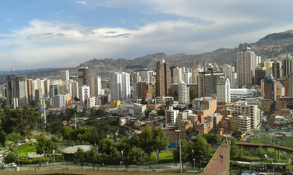 Vista desde el Parque Urbano Central